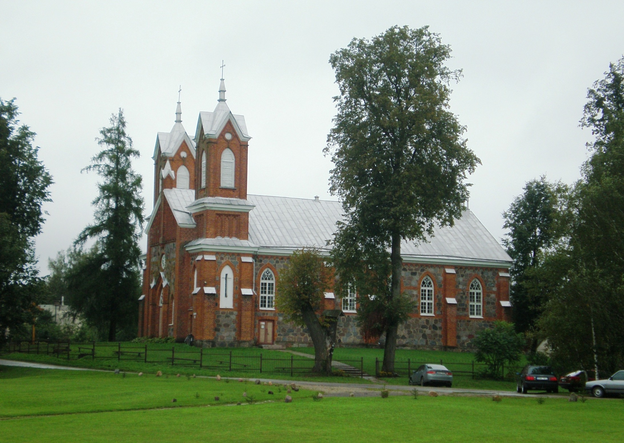 Gudelių bažnyčia, Marijampolės sav.